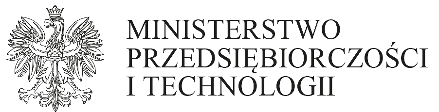 Logo Ministerstwa Przedsiębiorczości i Technologii